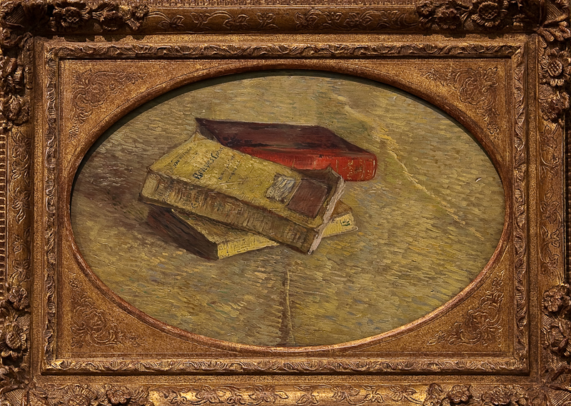 Vincent van Gogh 1853 - 1890 Drie boeken, 1887 Three books olieverf op paneel / oil on panel Van Gogh Museum, Amsterdam (Vincent van Gogh Stichting) Van Gogh hechtte zoveel waarde aan de eigentijdse literatuur, dat hij in Parijs maar liefst vier stillevens met moderne Franse romans schilderde. Bij het 'Stilleven met bijbel' stond hij nog kritisch tegenover de schilderkunstige vernieuwingen van de Franse impressionisten, maar in Parijs besefte hij dat het tonaal weergeven van licht en donker en zijn stemmig voor zwart wel erg ouderwets waren. Hij begon daarop intensief te experimenteren met een kleuriger palet en een meer uitgesproken schilderstijl, bestaande uit losse kleurtoetsjes. Van Gogh attached so much importance to contemporary literature that in Paris he painted no fewer than four still lifes of modern French novels. Earlier, when he painted Still Life with Bible, he had been critical of the new techniques of the French impressionists. Yet once he arrived in Paris, he realize that his tonal treatment of light and dark and his fondness for sombere shades of black were actually very old-fashioned. He began to experiment a great deal with a more colourful palette and a more expressive style of painting, composed of distinct dashes of colour. inv. S181 This photo was taken on 23 june 2009 during a one-time exclusive photo session at the Van Gogh Museum in Amsterdam for the Wiki Loves Art /NL project.